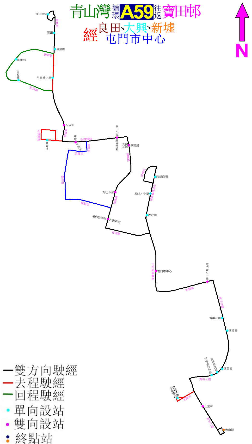 中文（香港）: 九鐵巴士A59線取消前的走線圖，當中藍線表示1999年改道前改經屯門工廠區的走線